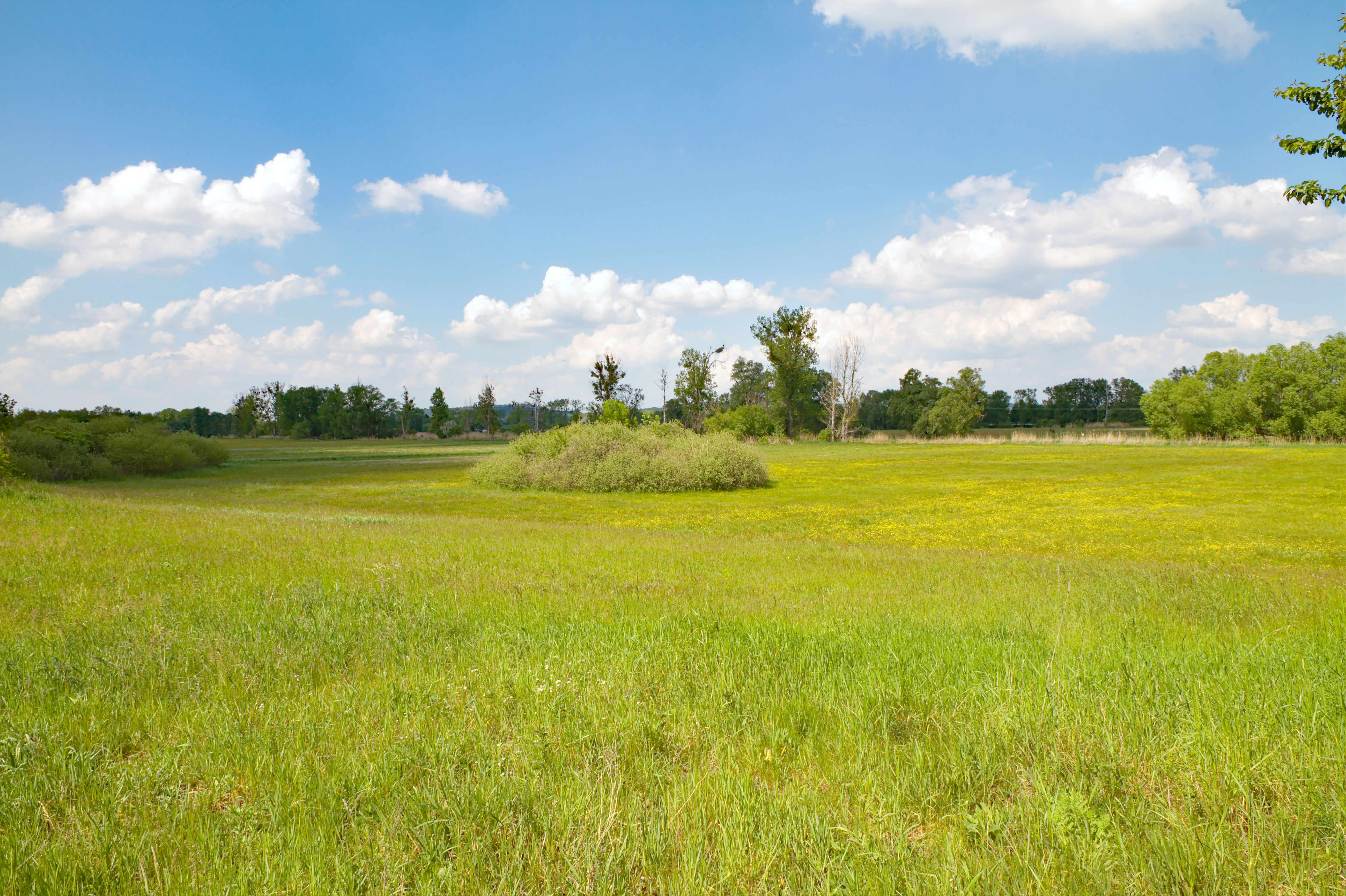 Südwestliche Grenze des Naturschutzgebiets Orchideenwiese Bad Freienwalde (Oder). Der Blick geht in Richtung Osten.